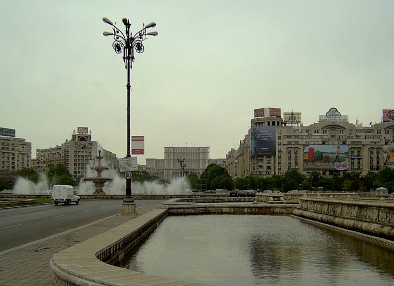 Boulevard Unirii Blick auf Palatul Parlamentului (Parlaments-Palast), Bukarest (Rumänien)